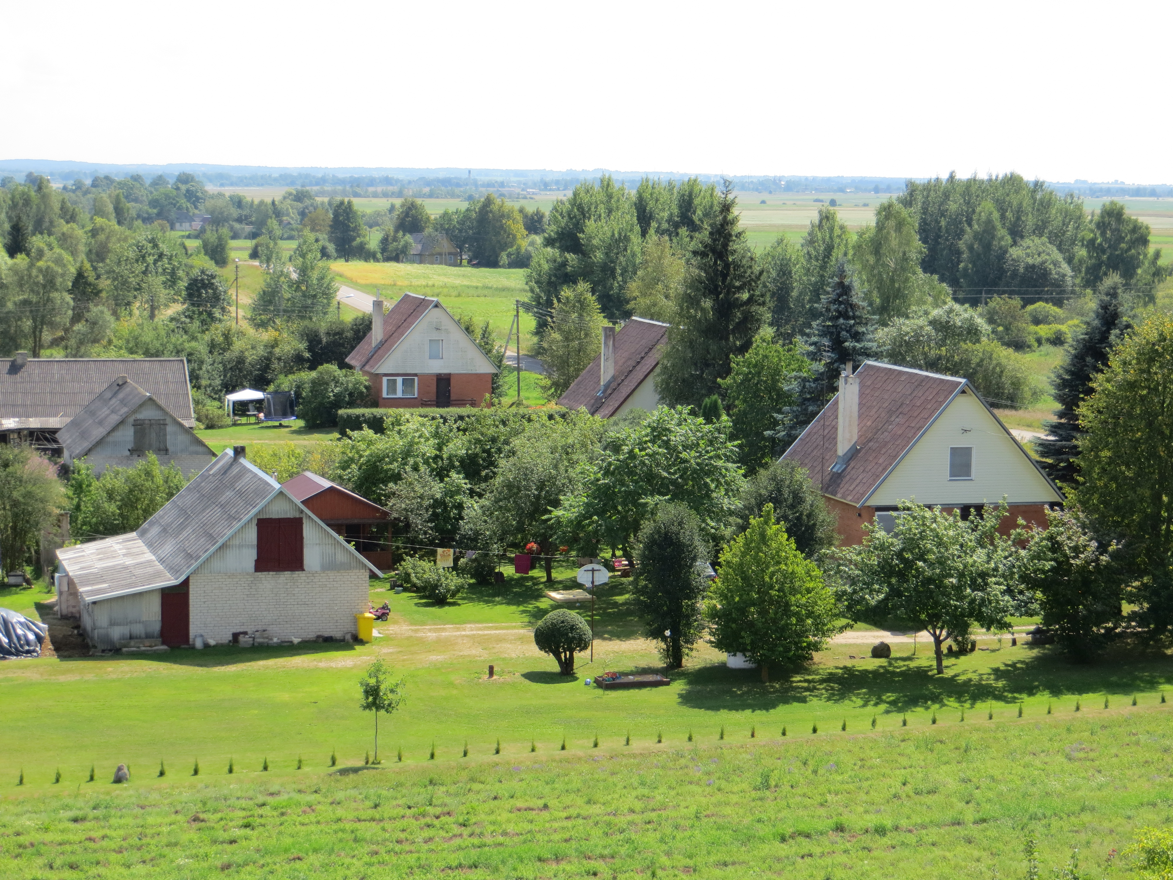 Jakeliai 18288, Lithuania